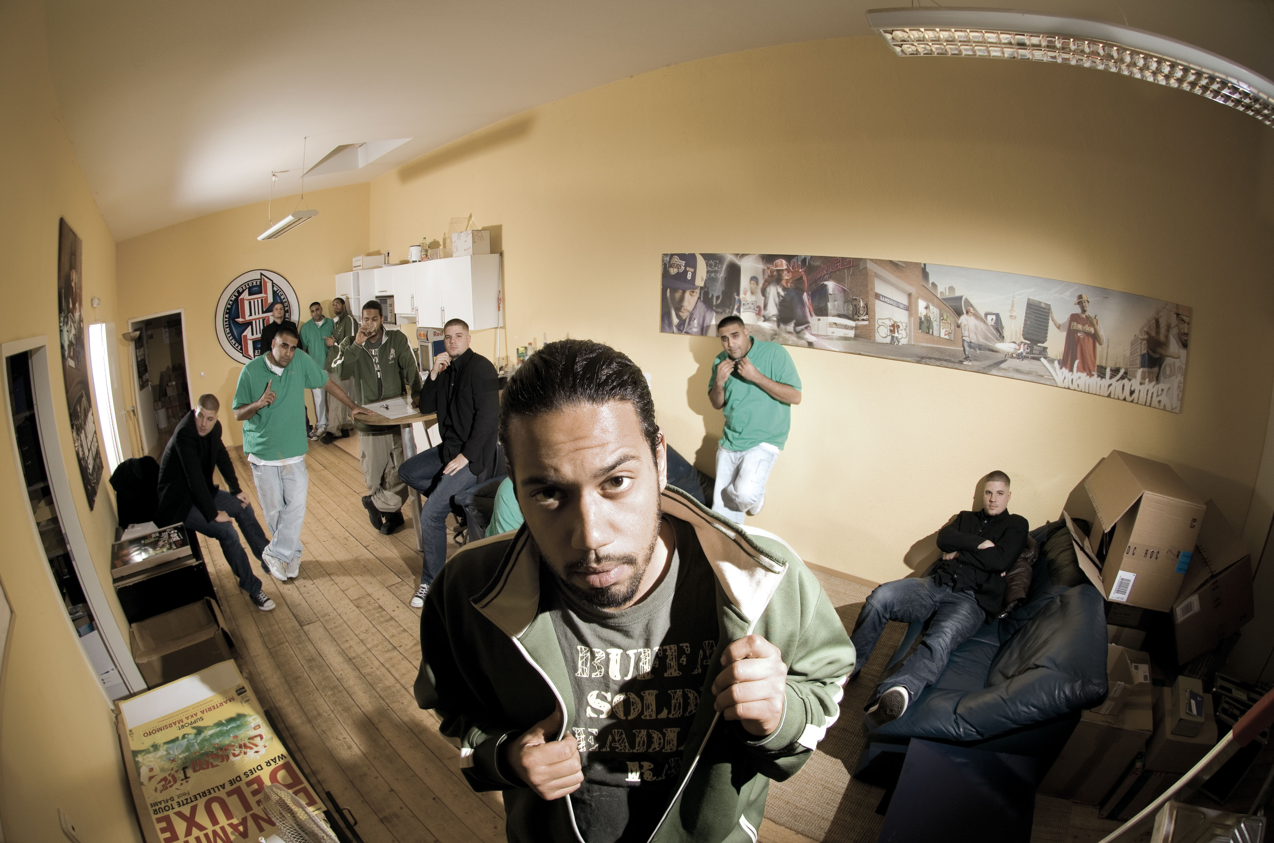 Pressefoto mit Ali A$, Samy Deluxe und Tua zur Veröffentlichung des Samplers „Liebling, ich habe das Label geschrumpft“